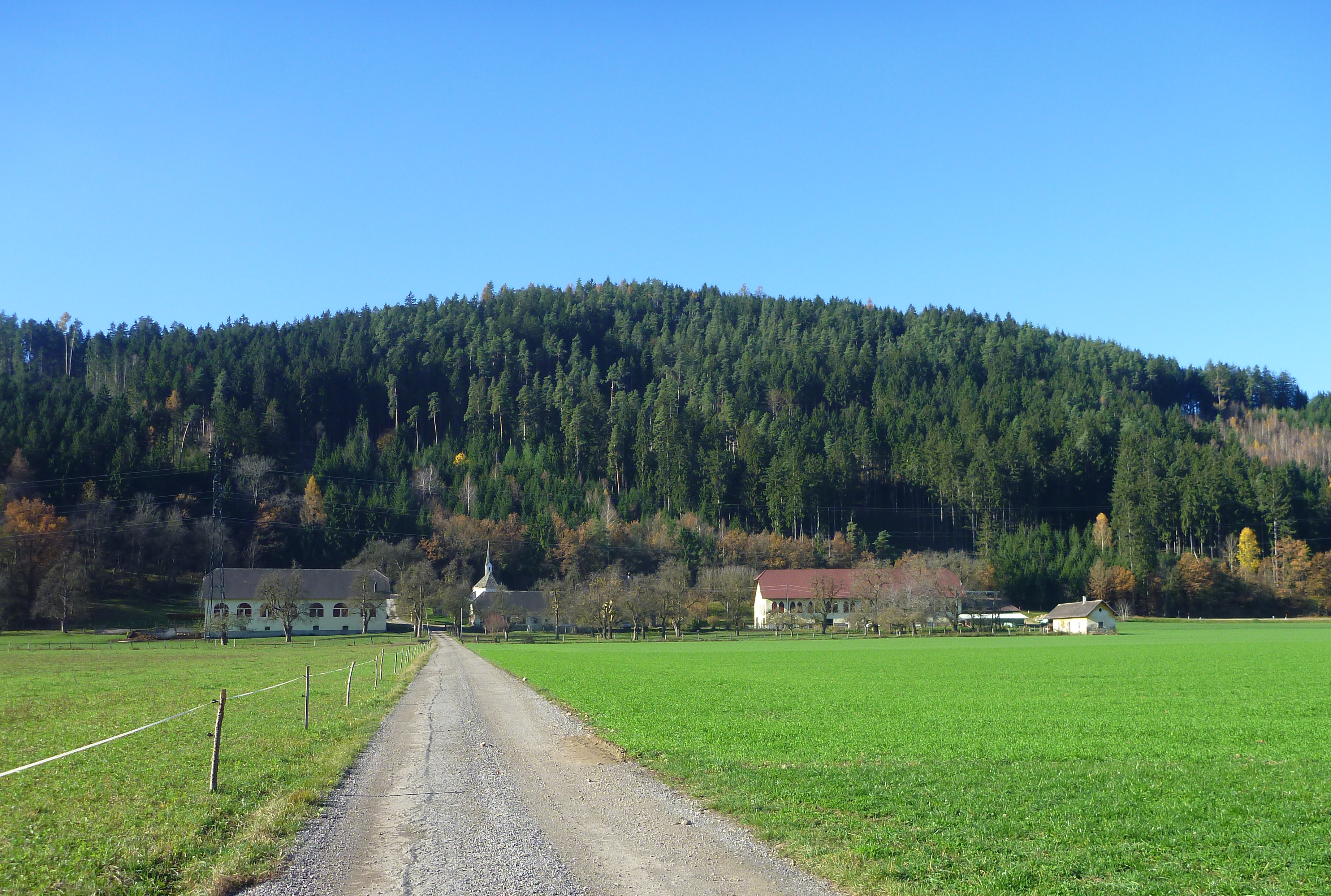 St. Andrä ist eine Ortschaft in der Stadtgemeinde St. Veit an der Glan